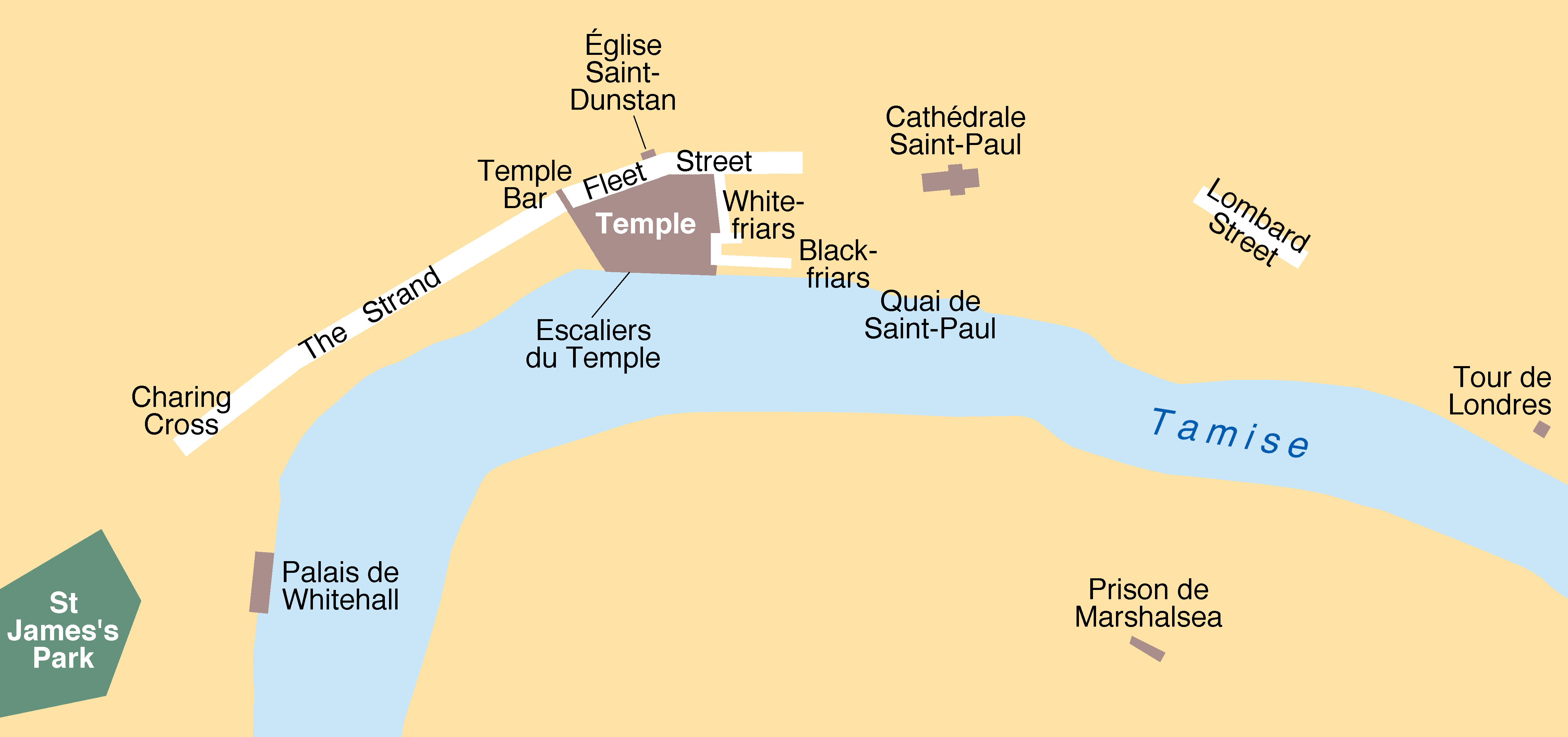 Plan simplifié du centre de Londres vers 1620, où ne figurent que quelques lieux du roman Les Aventures de Nigel de Walter Scott, d'après des cartes anciennes (XVIe à XIXe siècle).